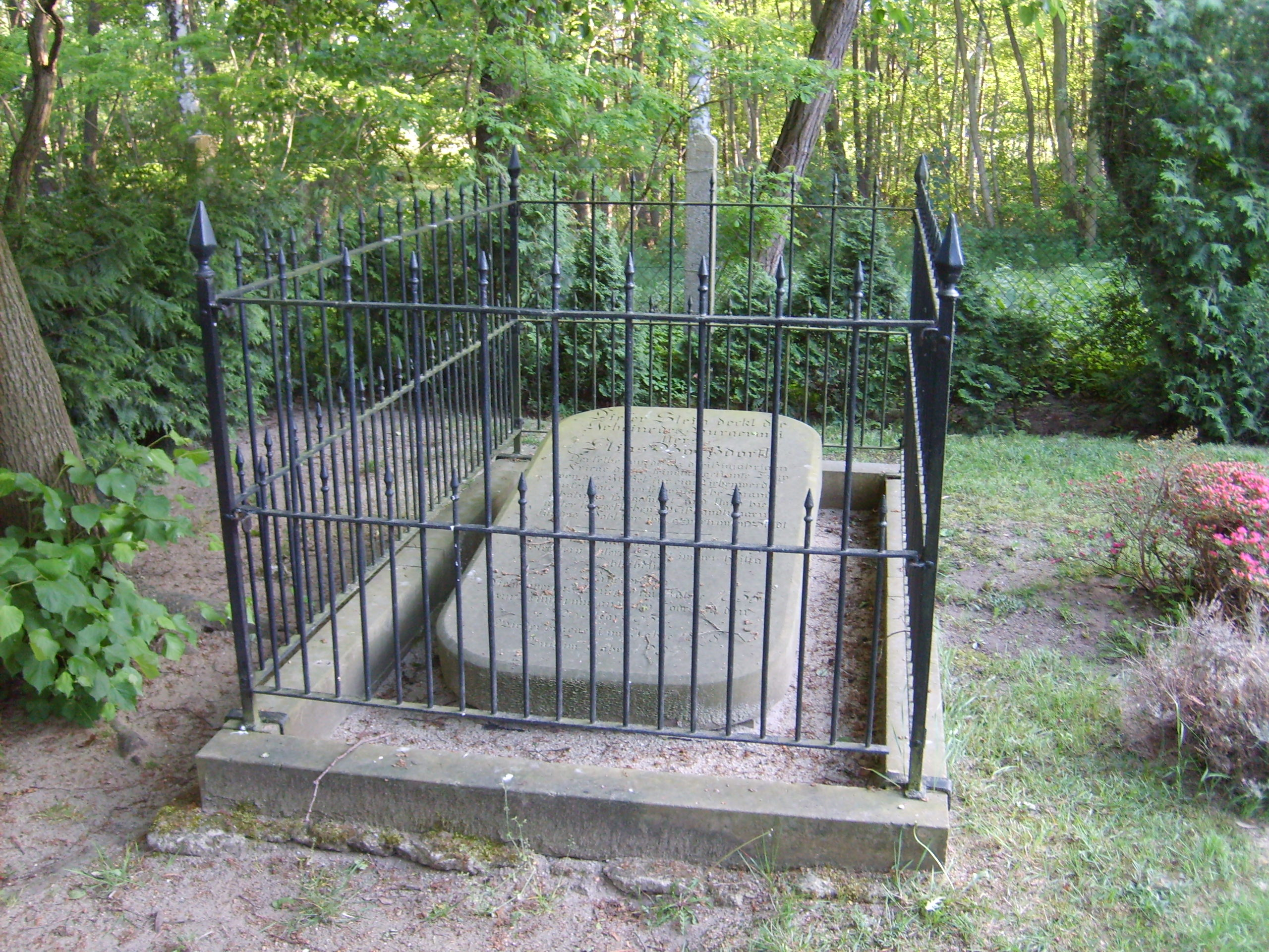 Der Borßdorf-Grabstein in Zeischa.